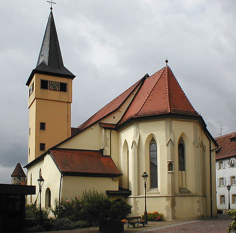 Stadtpfarrkirche St. Nikolaus in Gundelsheim am Neckar. Ursprünglich Spitalkirche des Deutschen Ordens, barockisiert nach 1700, erweitert 1922/23, Turmneubau 1976.